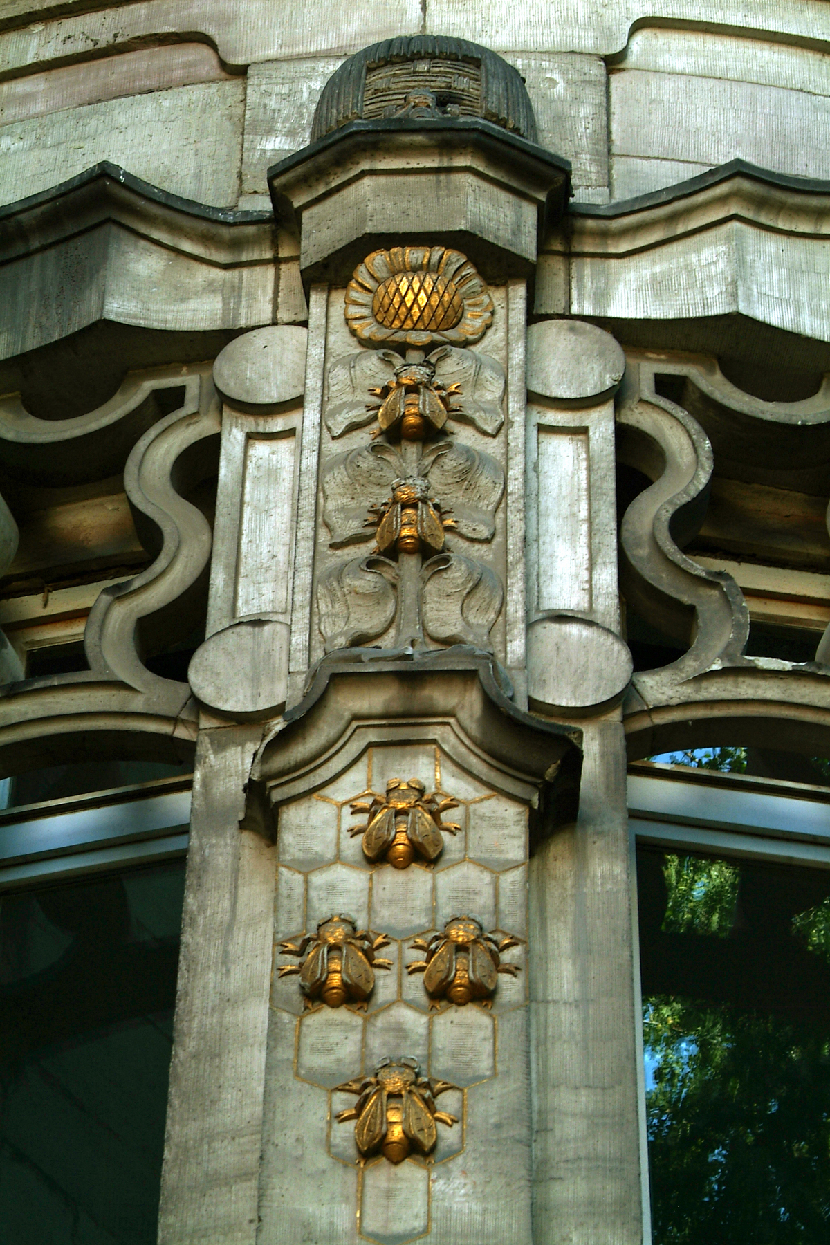 Jugendstil-Dekor an der Wilhelm-Raabe-Schule in Hannover. Über dem ehemaligen Eingang an der Langensalzastraße 34 symbolisieren die nach oben krabbelnden Bienen etappenweisen Fleiß, mit der sie schließlich zur Sonne(enblume), nach oben gelangen.